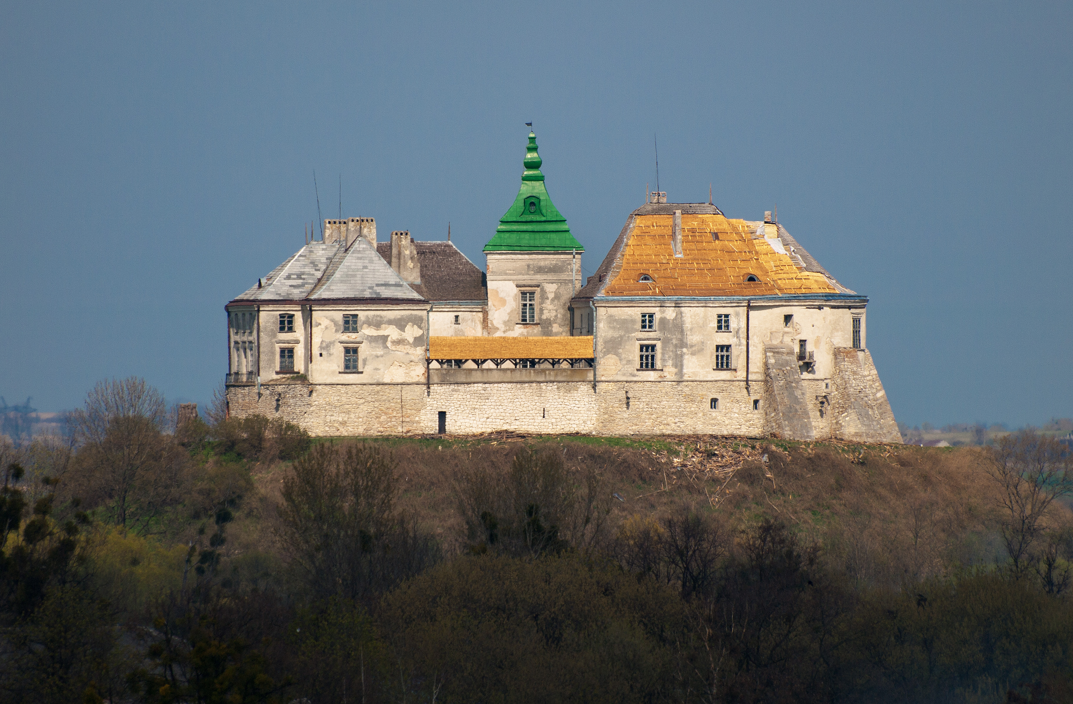 Замок Даниловичів (мур.), Олесько